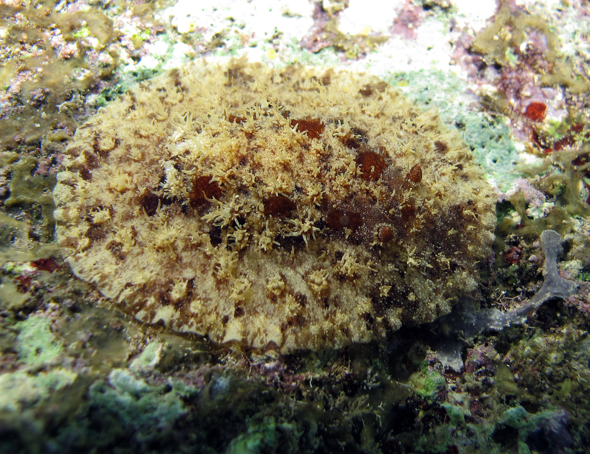 Un Otinodoris raripilosa à la Réunion.